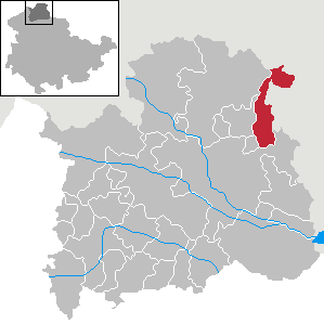 Gemeinde Herrmannsacker in Thüringen, Landkreis Nordhausen